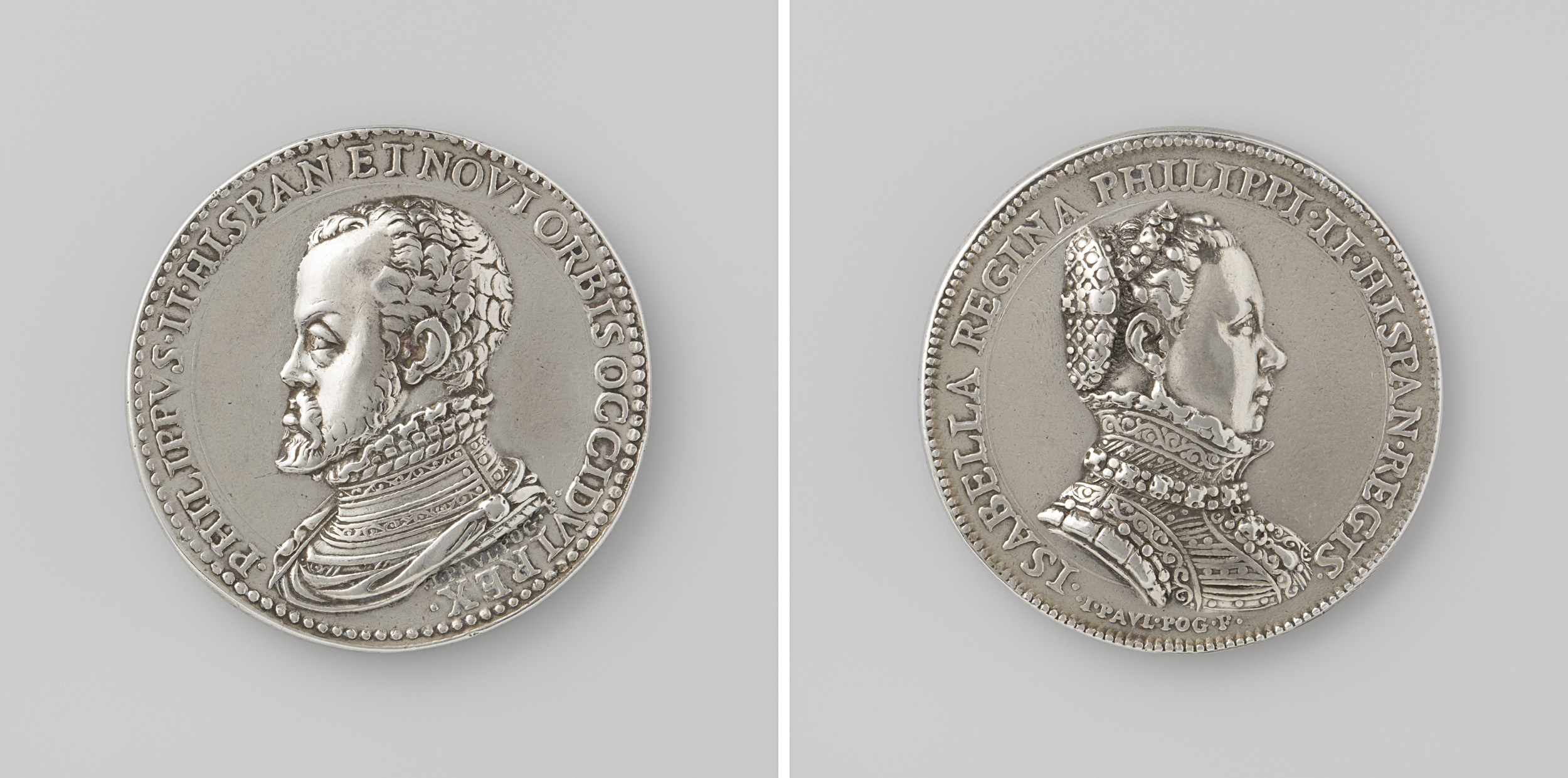 IdentificatieTitel(s): Huwelijk van Filips II van Spanje en Elisabeth van Valois, dochter van Hendrik II, ter bekrachtiging van de vrede van Le Cateau-CambresisObjecttype: historiepenning Objectnummer: NG-VG-1-316Opschriften / Merken: omschrift, voorzijde: ‘PHILLIPVS II HISPAN ET NOVI ORBIS OCCIDVI REX’ (Filips II, koning van Spanje en van de Nieuwe Wereld in het westen.) (Bron: Pietersen 1979)omschrift, keerzijde: ‘ISABELLA REGINA PHILIPPI II HISPAN REGIS’ (Elisabeth, koningin van Filips II, koning van Spanje) (Bron: Pietersen 1979)Omschrijving: Zilveren penning. Voorzijde: borststuk man binnen omschrift. Keerzijde: borststuk vrouw binnen omschriftVervaardigingVervaardiger: Gianpaolo PogginiPlaats vervaardiging: MadridDatering: 2-apr-1559 - 18-jun-1559Materiaal: zilver Techniek: gietenAfmetingen: d 3,9 cm. × g 382 grOnderwerpWat: Oorlog tussen Filips II en Hendrik IIVrede van Le Cateau-CambrésisWanneer: 1559-04-03 - 1559-04-03Waar: Le Cateau-CambrésisWie: Filips II (koning van Spanje)Elisabeth van Valois (koningin van Spanje)Verwerving en rechtenCredit line: Schenking van mevrouw J.M. van Gelder-NijhoffVerwerving: schenking 1885Copyright: Publiek domein